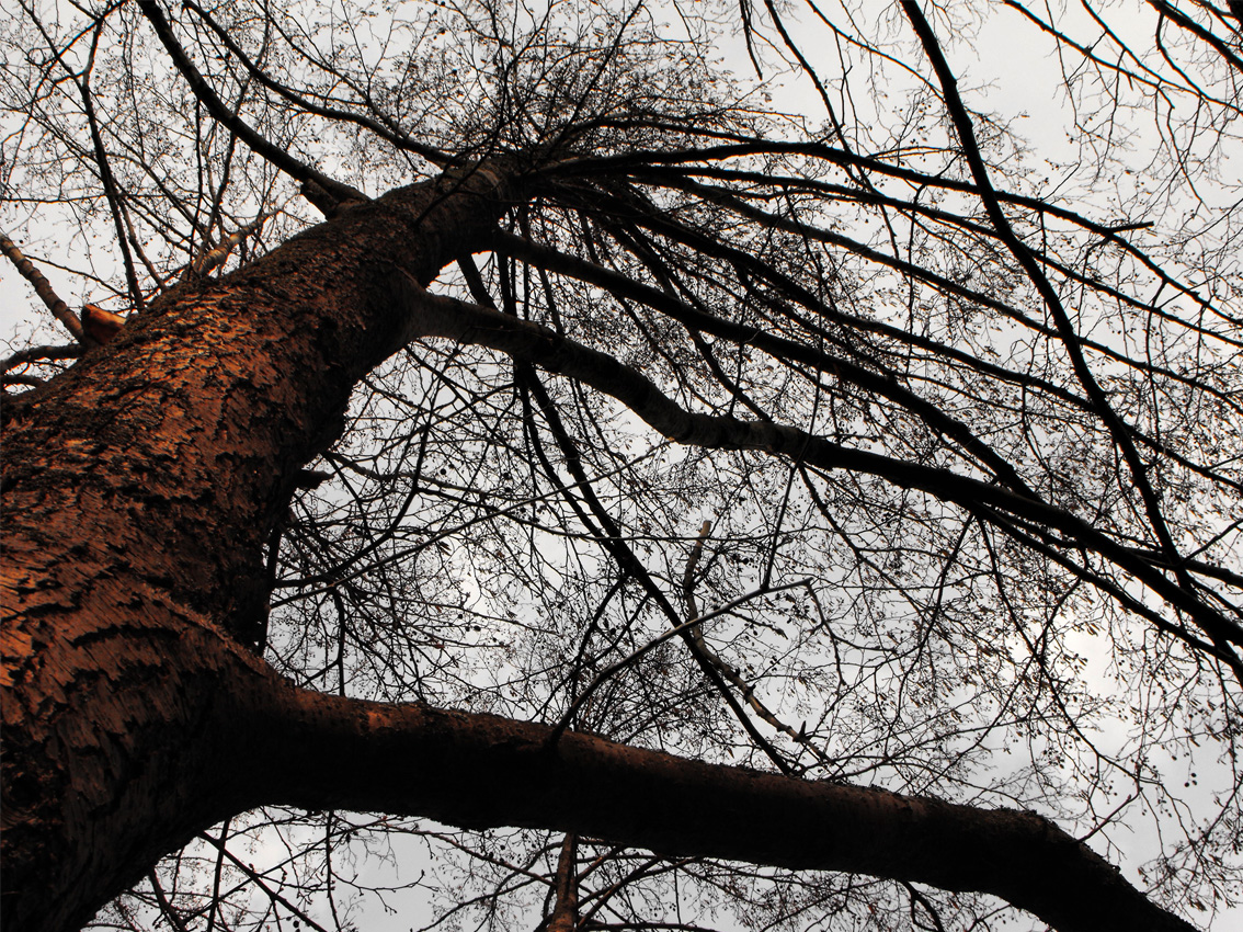 Ramification